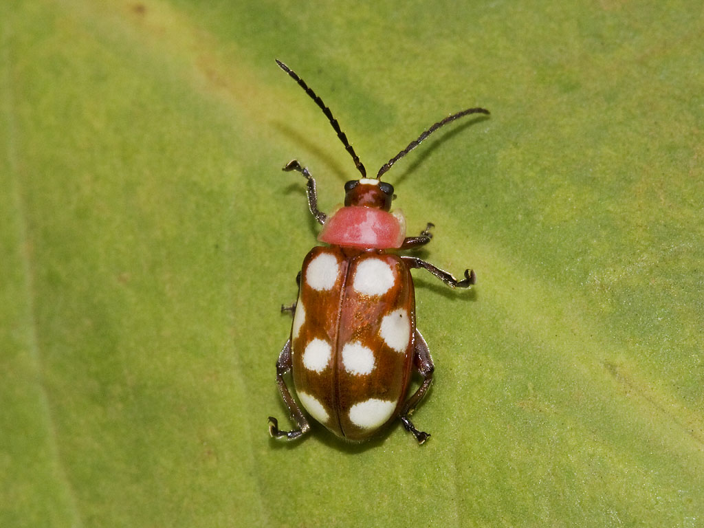 UNAM Bio Station, Catemaco, Veracruz, Mexico June 4